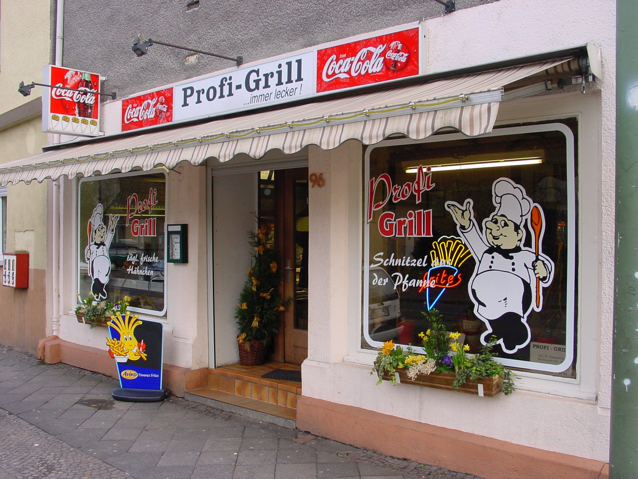 Profi-Grill in Wattenscheid, Außenansicht